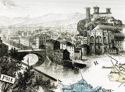 Foix (Ariège, France) et son château.